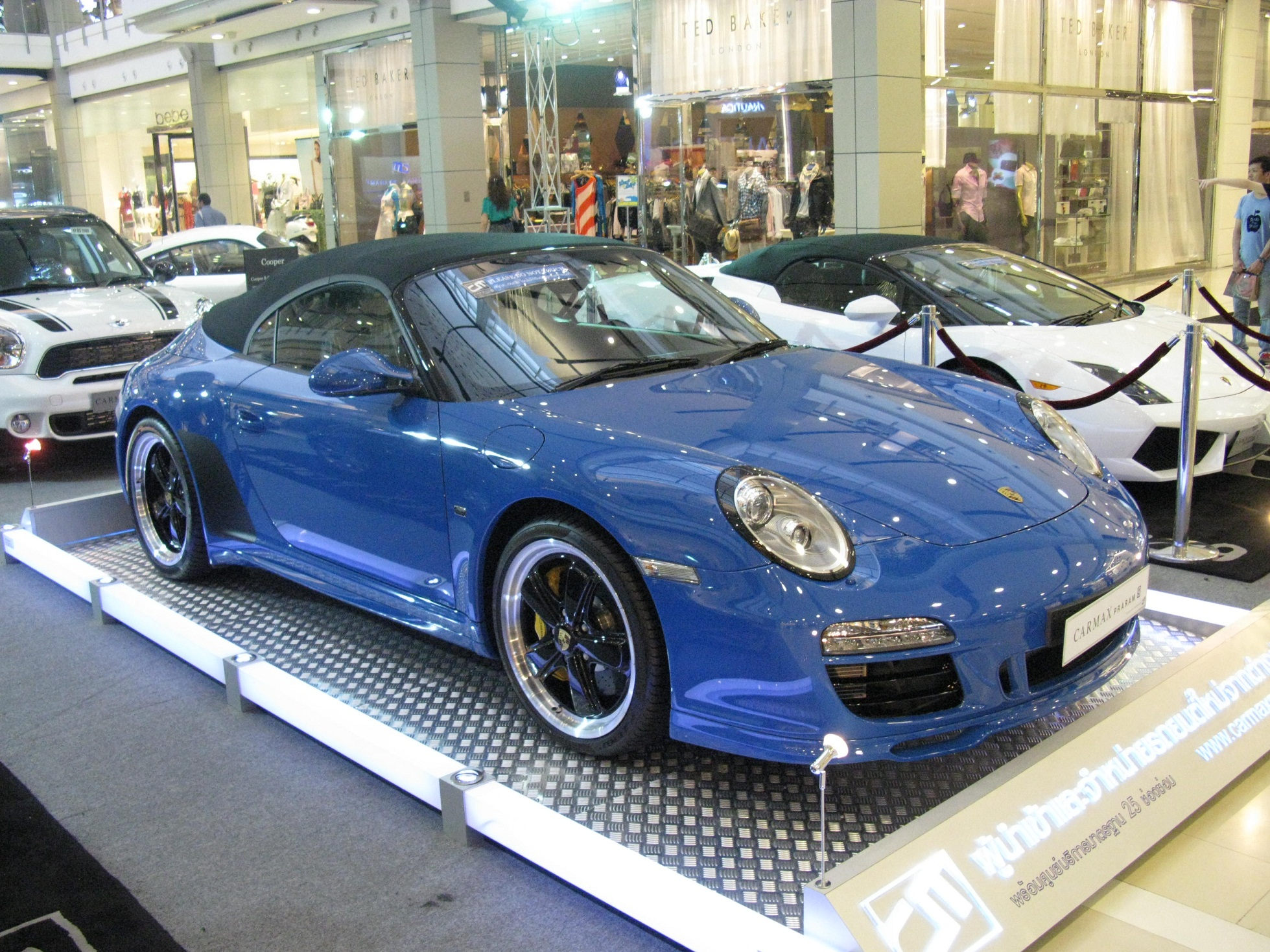 Central World, Bangkok